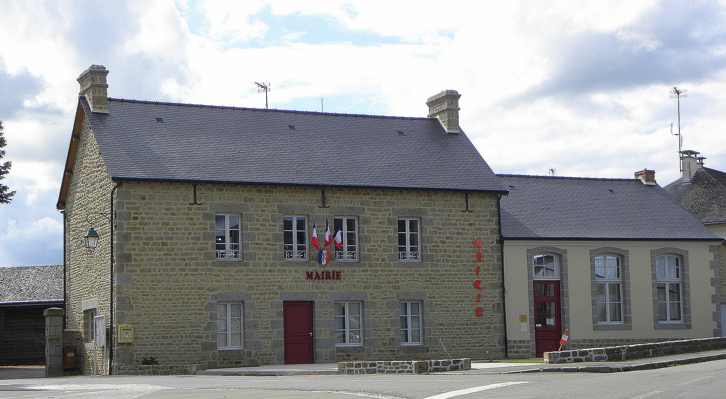 Mairie de Brecé (53).